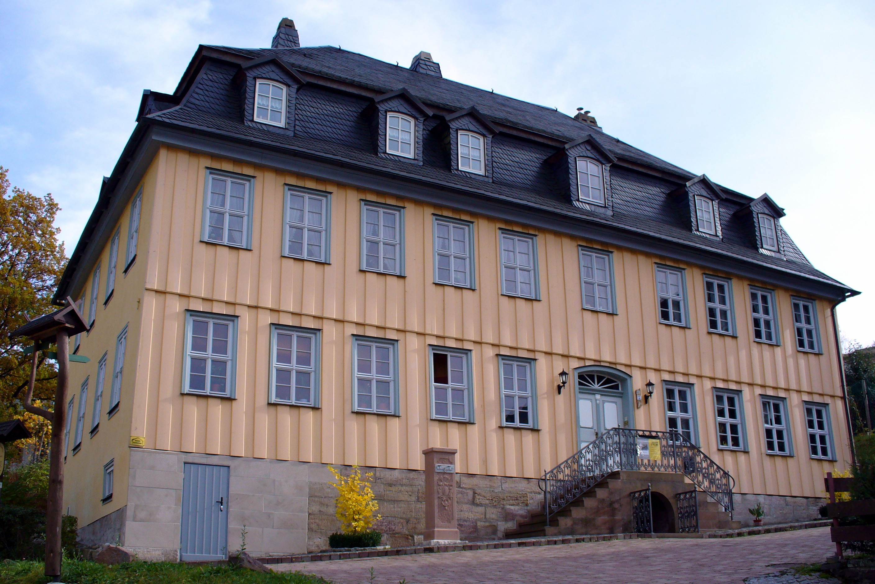 Glaser'sches Haus in Stützerbach